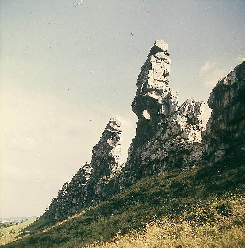 Original image description from the Deutsche FotothekFelsformation Teufelsmauer bei Neinstedt